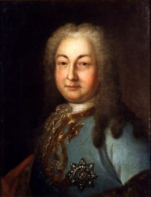 Heinrich Johann Friedrich Ostermann